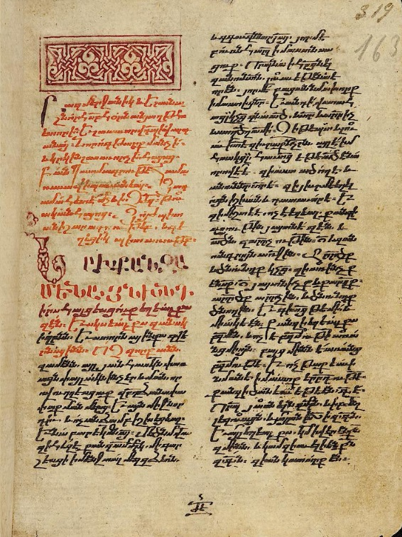 Վարդան Արեւելցի, Պատմութիւն